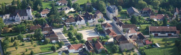 Vue aérienne de Vielleségure